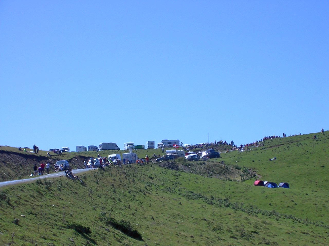 Col d'Erroymendi